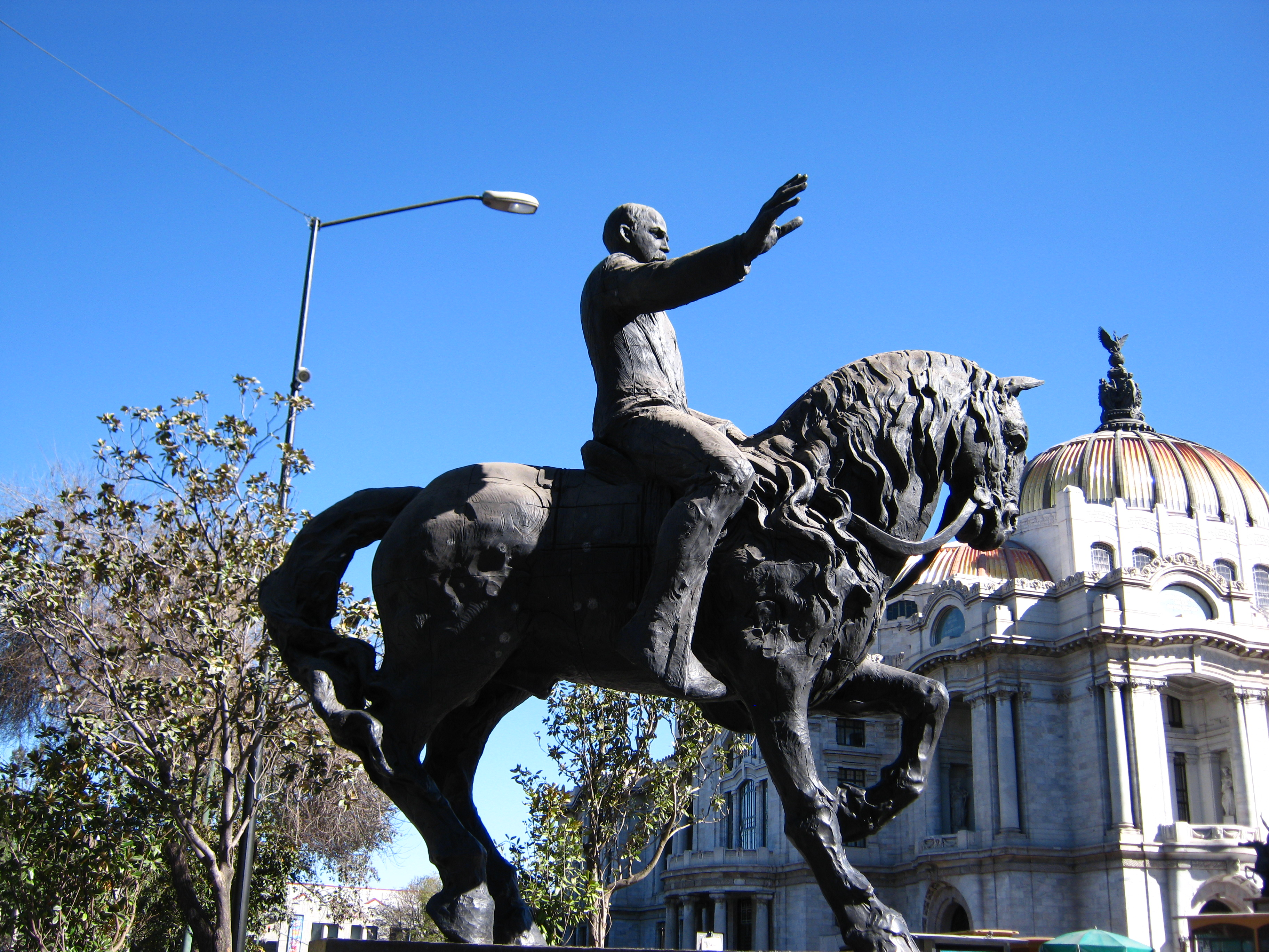 Francisco I. Madero frente al Palacio de Bellas Artes